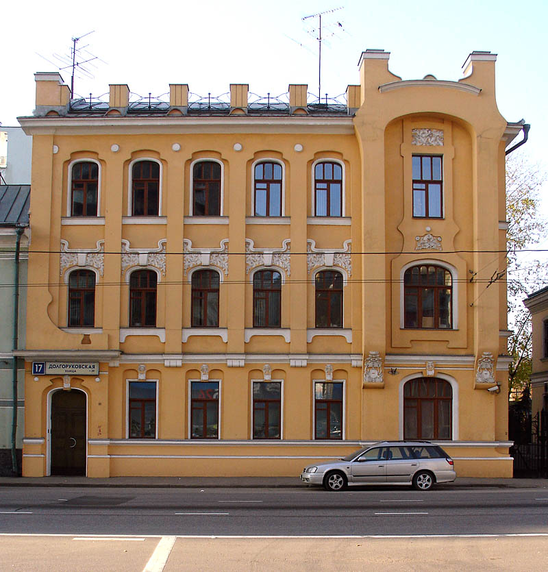 Долгоруковская улица Dolgorukovskaya Street, Moscow